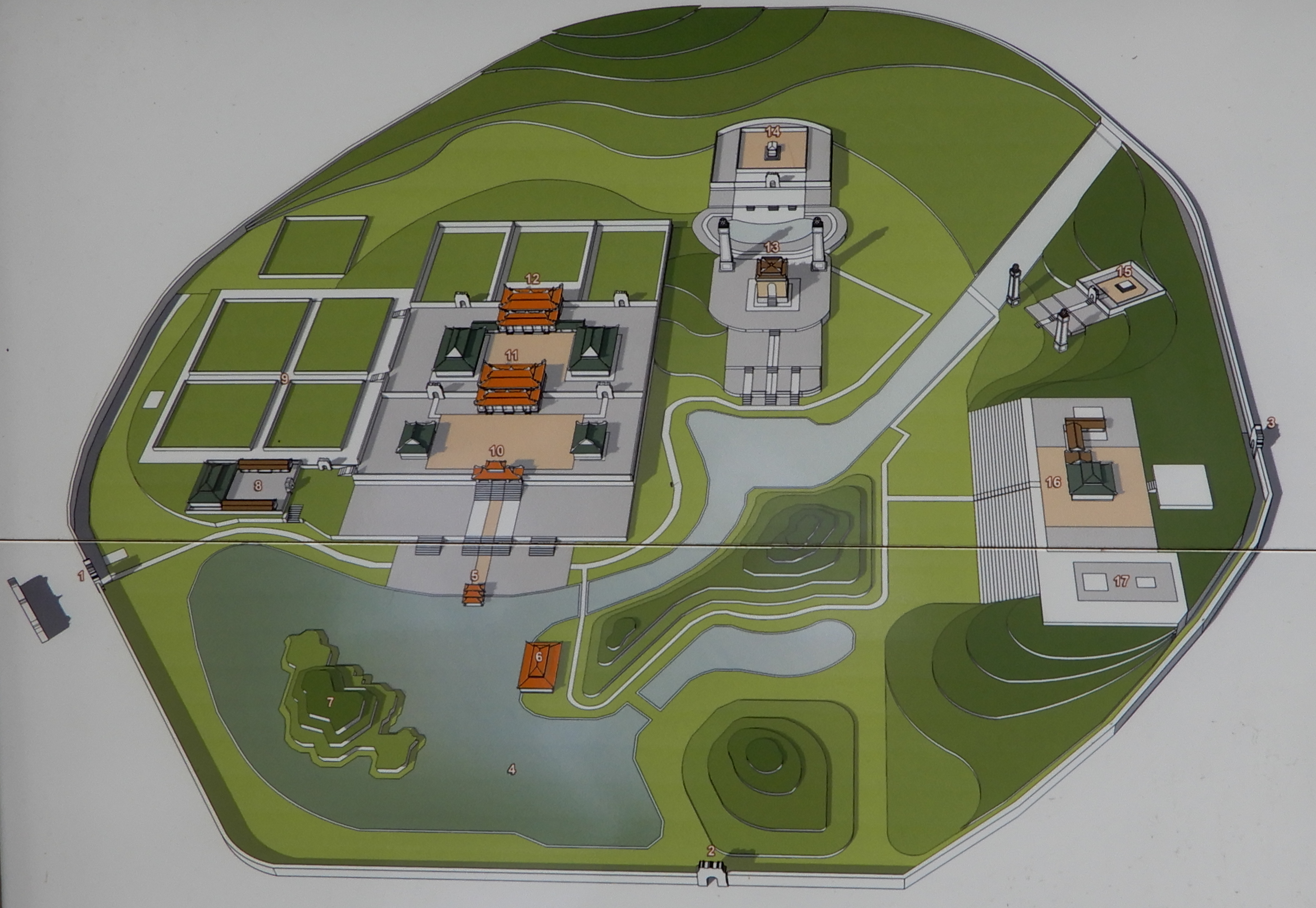 Vietnam, Hue, Tu Duc Tomb